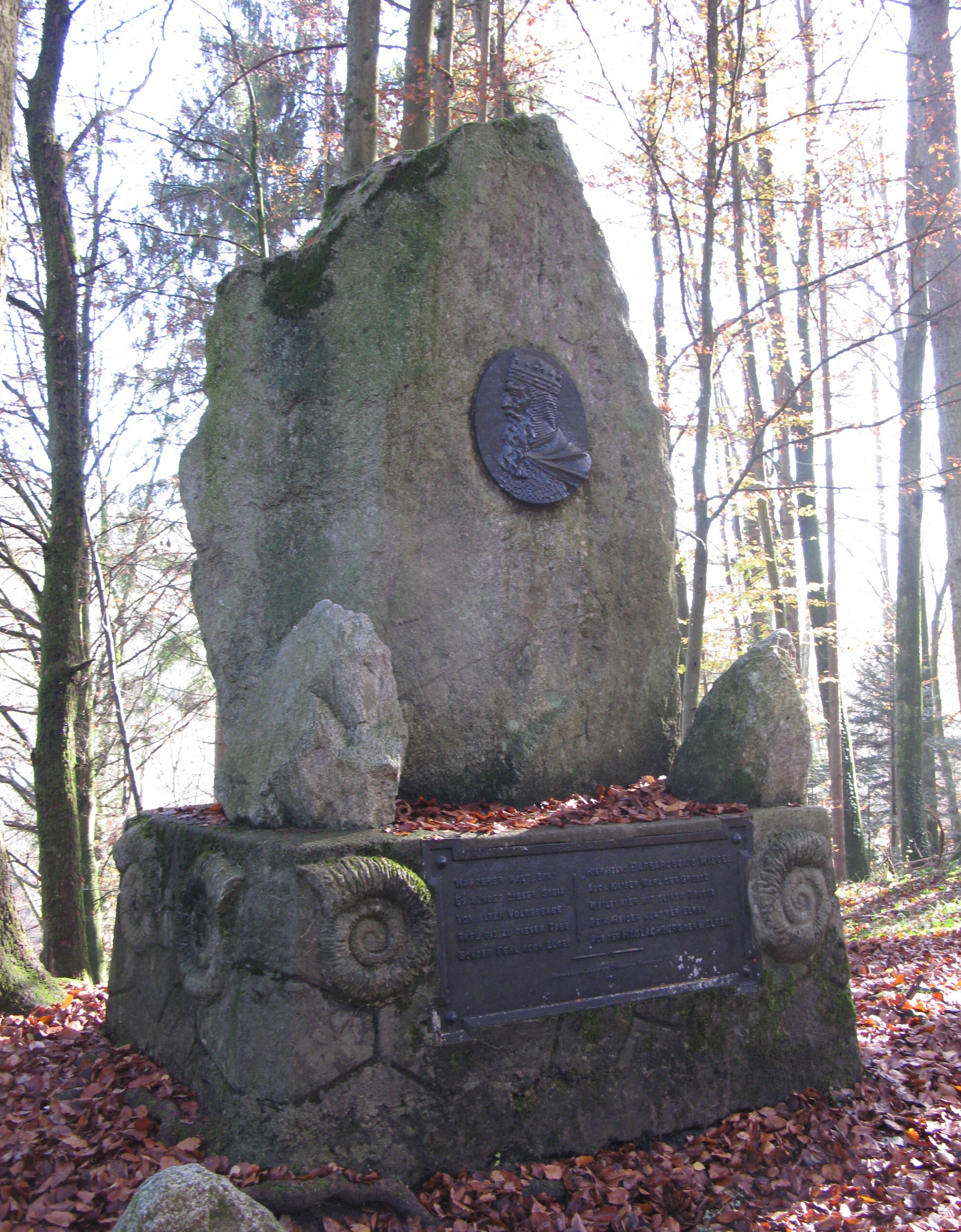 Barbarossastein neben Weingarten